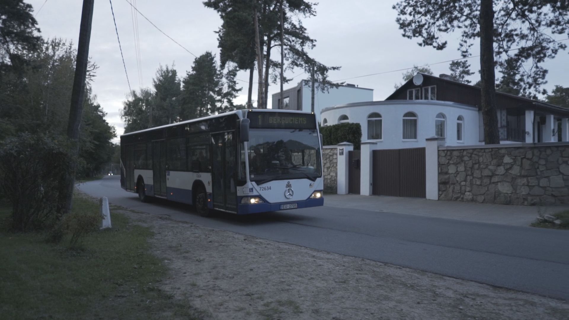 1. Autobuss Jaunības ielas pieturā